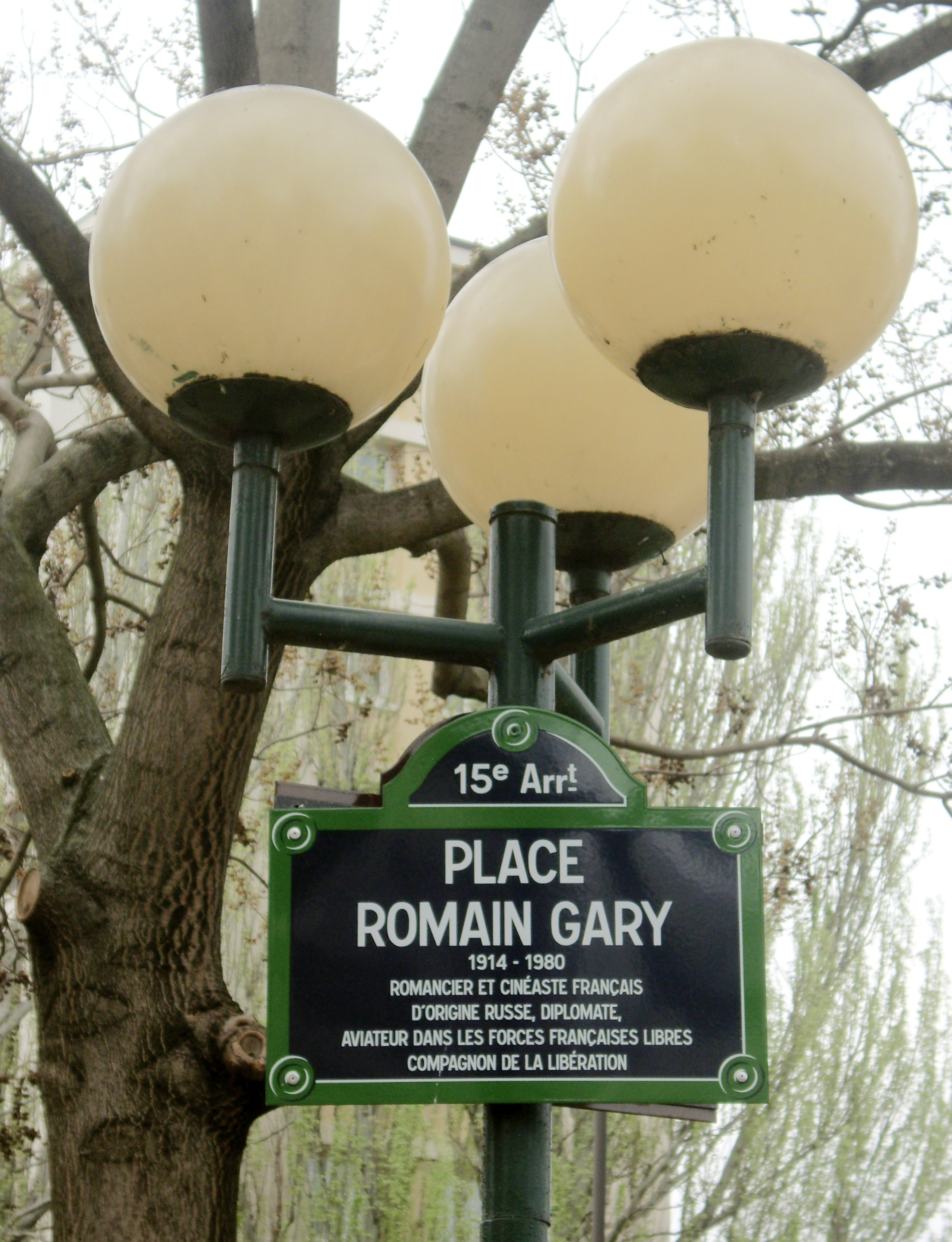 Place Romain-Gary, Paris 15e. « Romain Gary, 1914-1980, romancier et cinéaste français d'origine russe, diplomate, aviateur dans les Forces françaises libres, Compagnon de la Libération. »